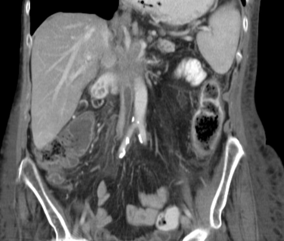 Pfortaderverschluss mit kavernöser Transformation bei Pankreaskarzinom. Hier zusätzlich dargestellte Thrombose der Vena cava inferior. Computertomographie.